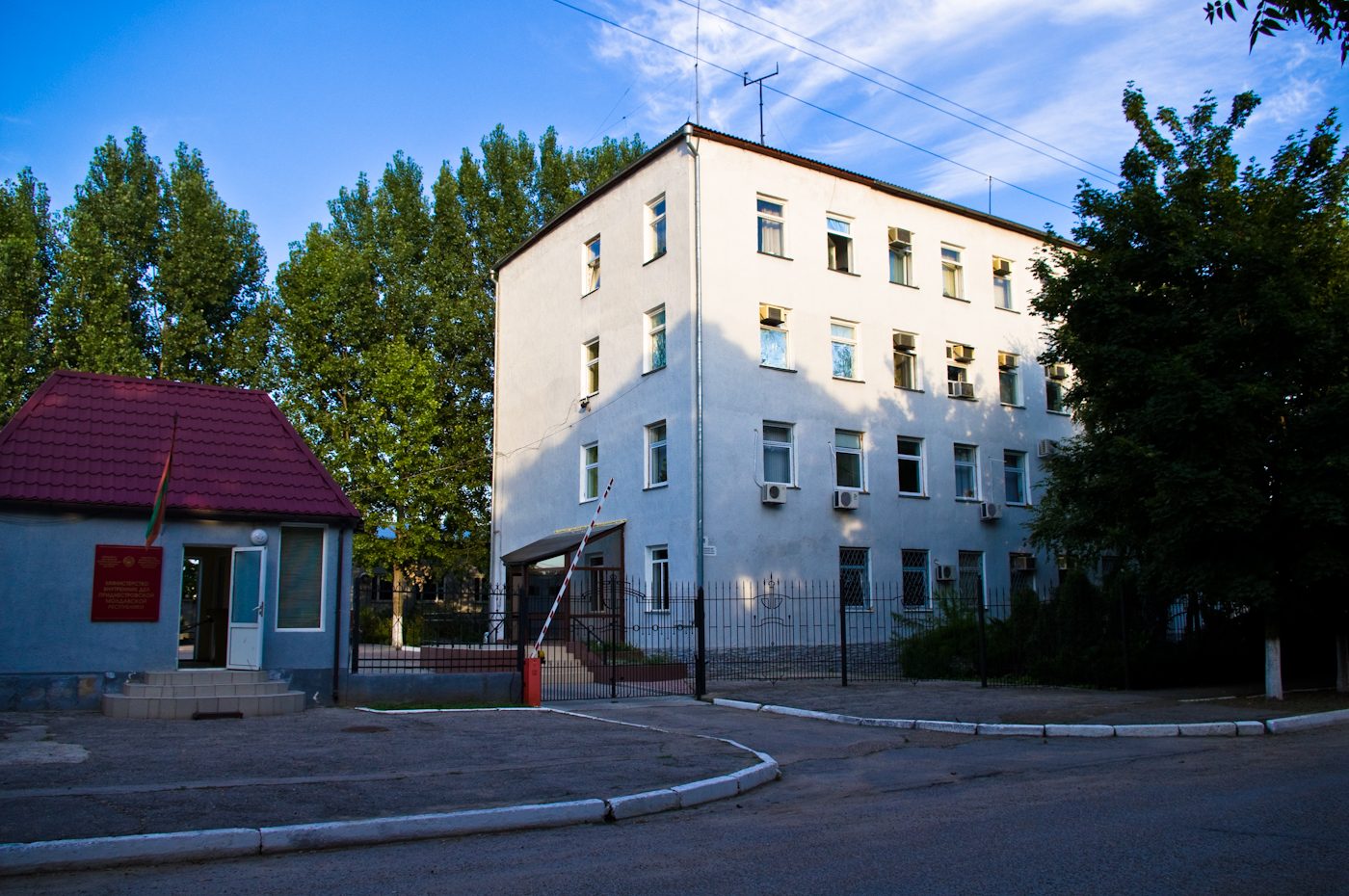 Министерство внутренних дел Приднестровской Молдавской Республики в Тирасполе на улеце Манойлова.